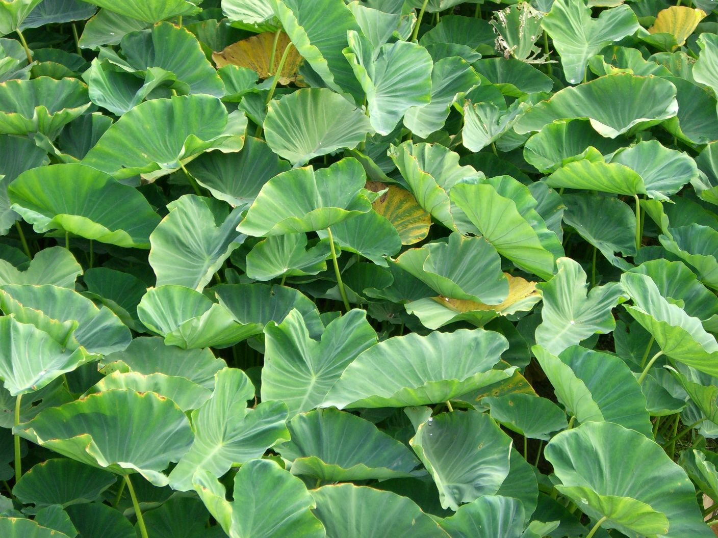 Taimo (taro grown on marsh), Okinawa, Japan.(沖縄のタイモ)